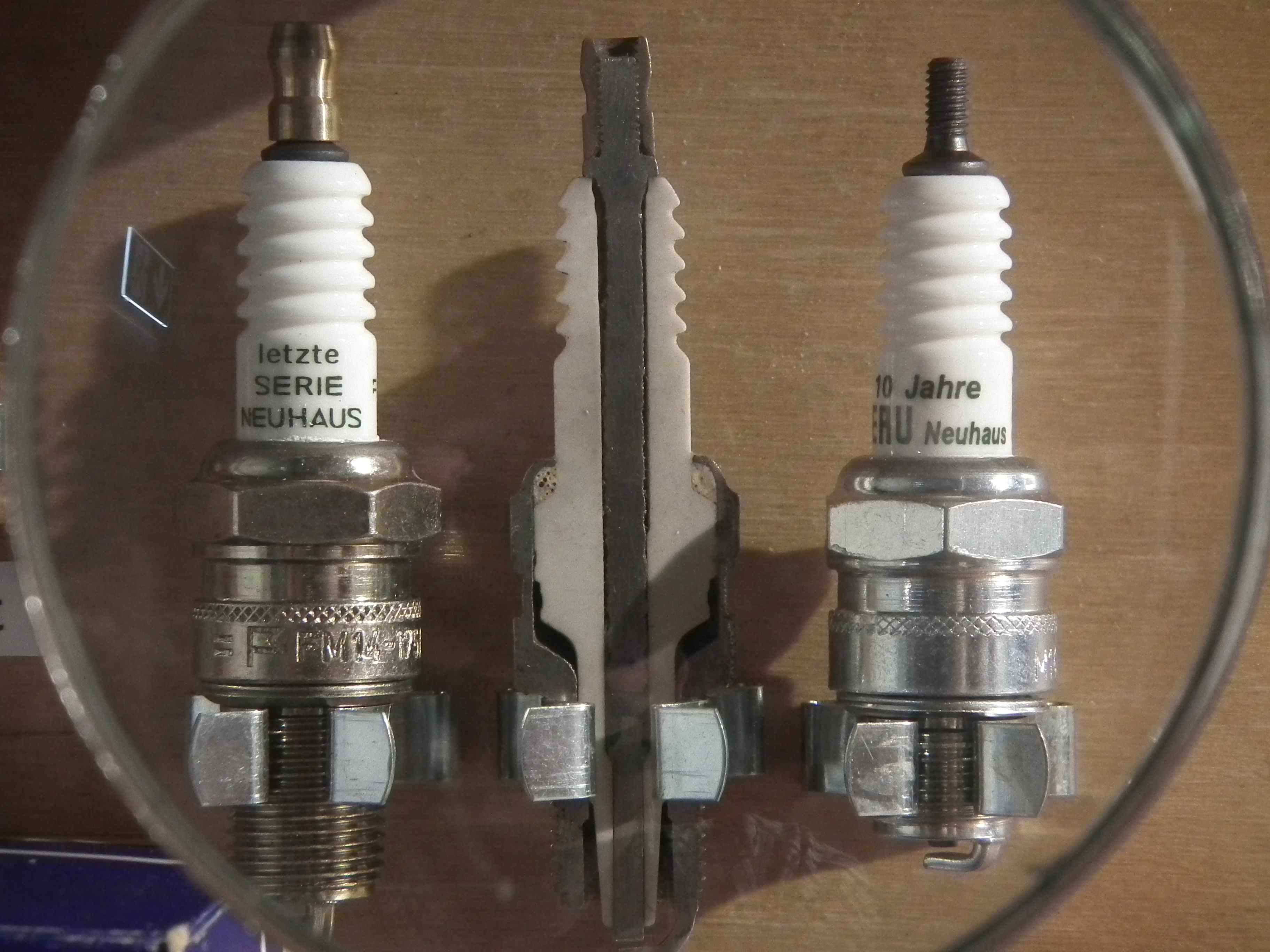 Dresden - Die Welt der DDR